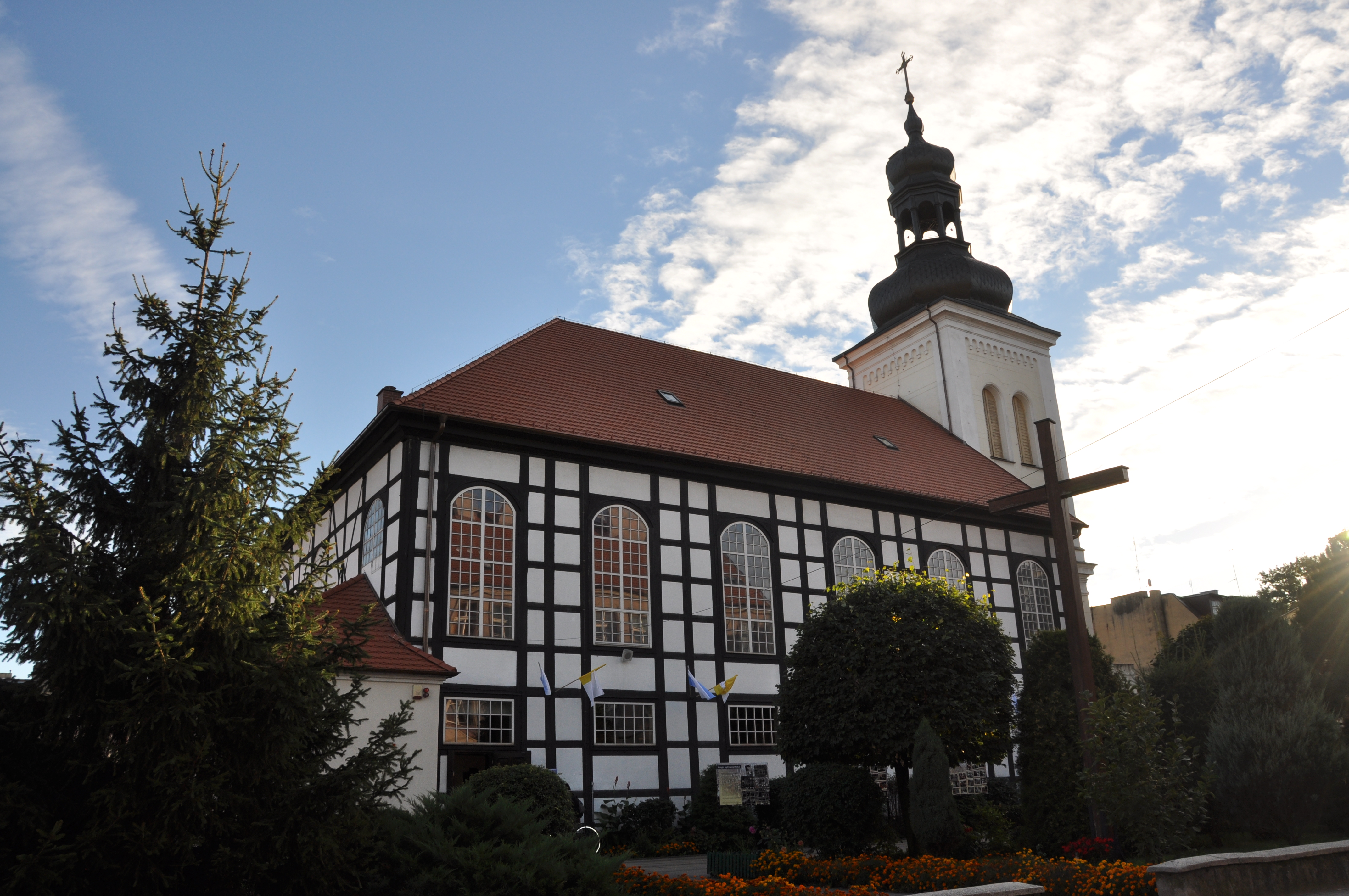 Ostrów Wielkopolski, ul. Królowej Jadwigi - dawny kościół ewangelicki, obecnie rzymskokatolicki pw. MB Królowej Polski, szachulcowo-murowany z 1788 r., poł. XIX w. (zabytek nr 581/A)